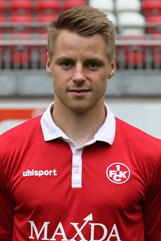 Michael Schindele